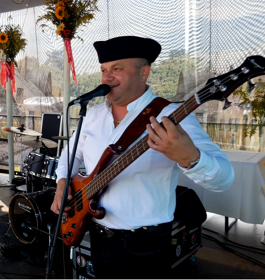 BACIARY - Janusz Body, gitara basowa, śpiew